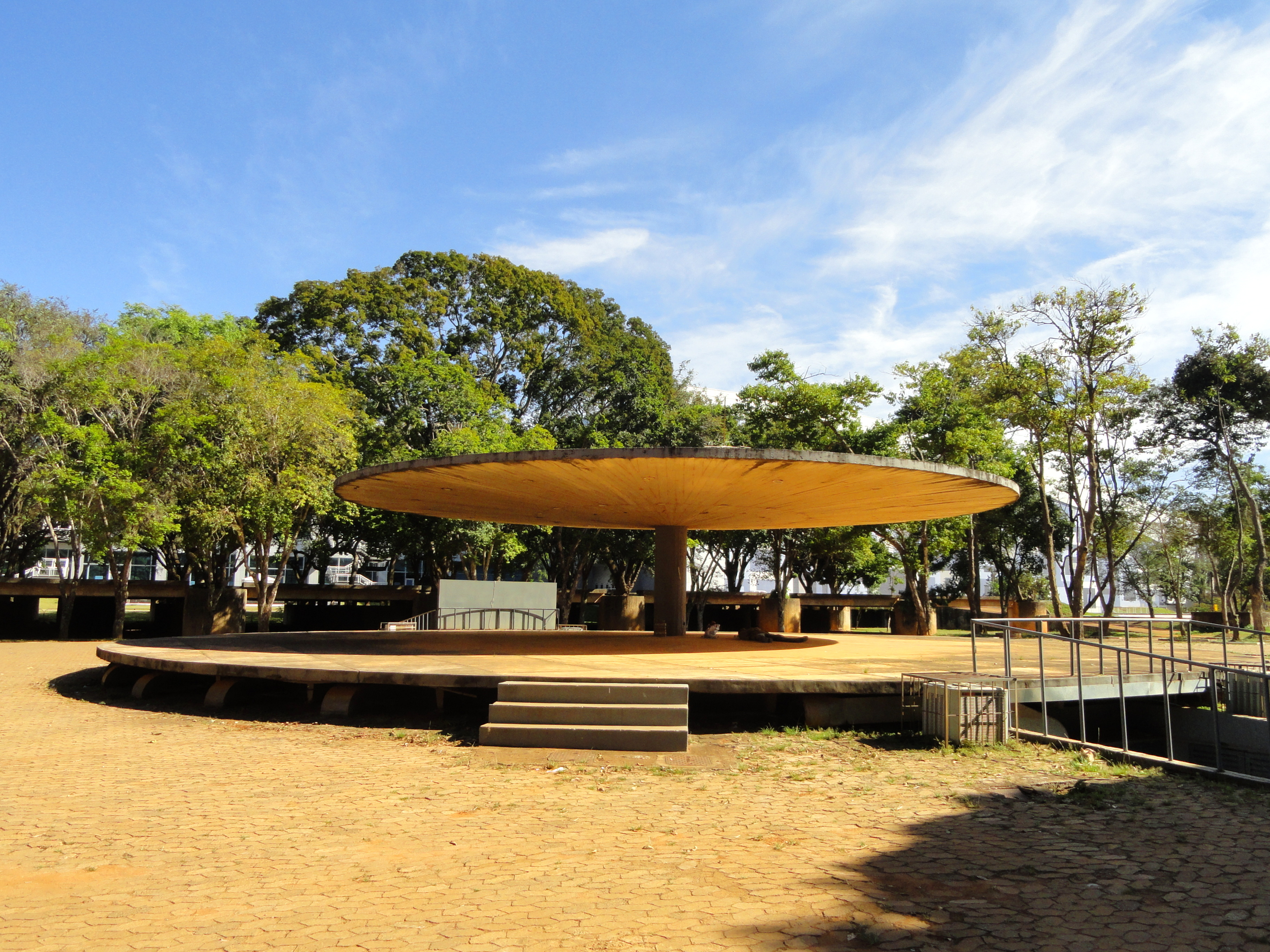 Clube do Choro, Brasília, Brazil.